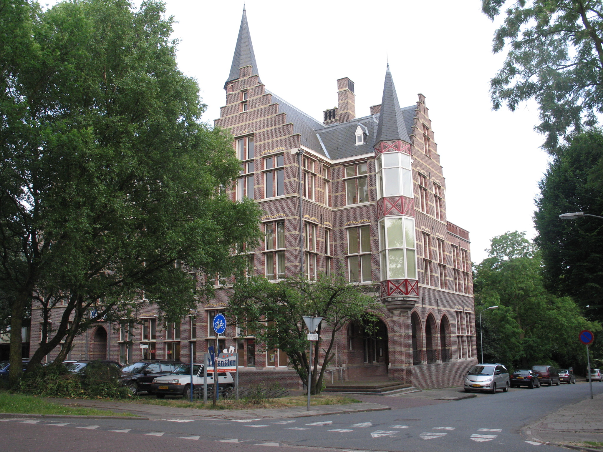 Rijksmonument in Wageningen 't Venster, voormalige school, Wilhelminaweg 1